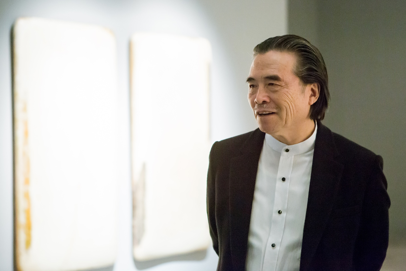 藝術家蘇笑柏照